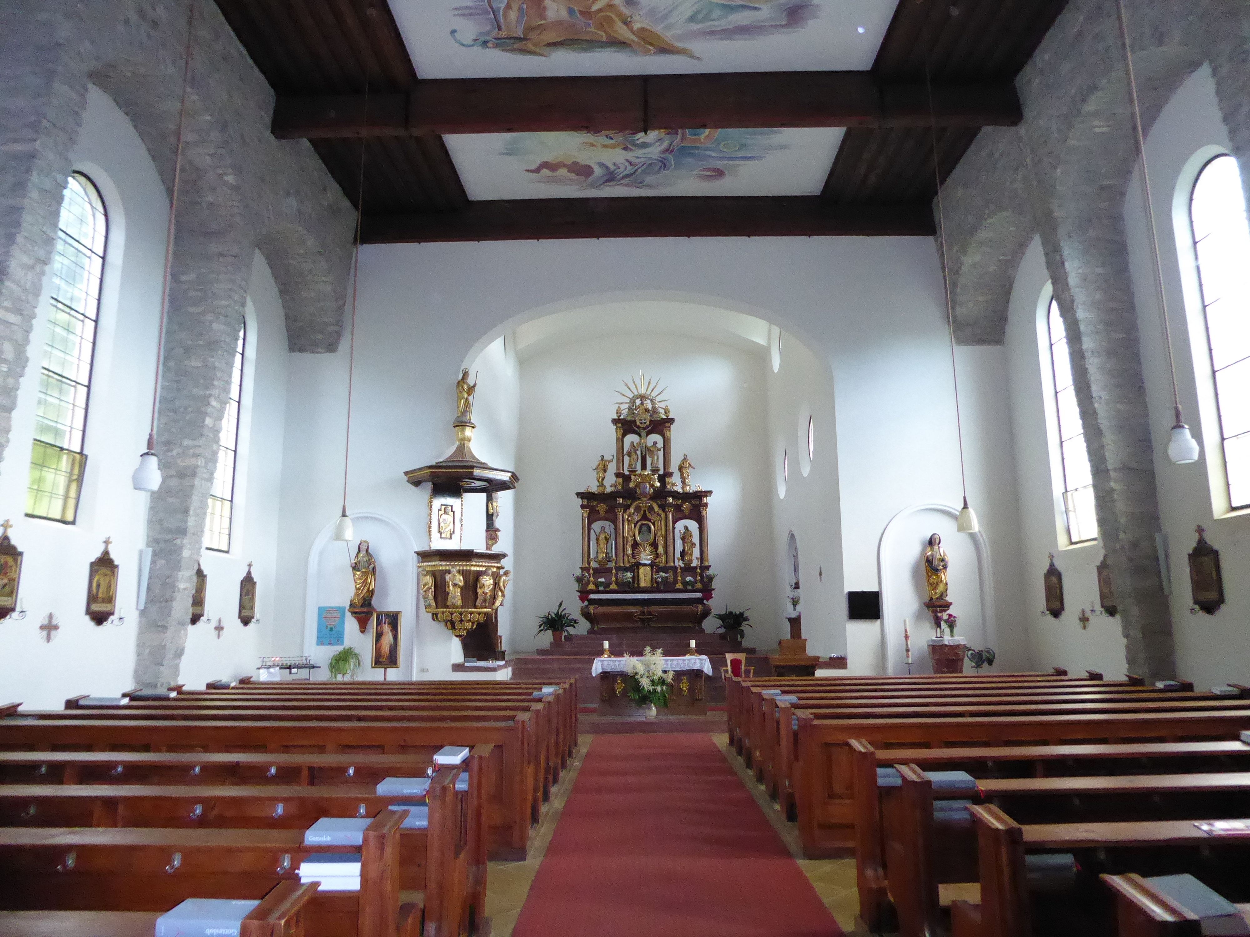 Pfarr- und Wallfahrtskirche Maria Schnee, Plankenstein 15a, Texingtal, Niederösterreich